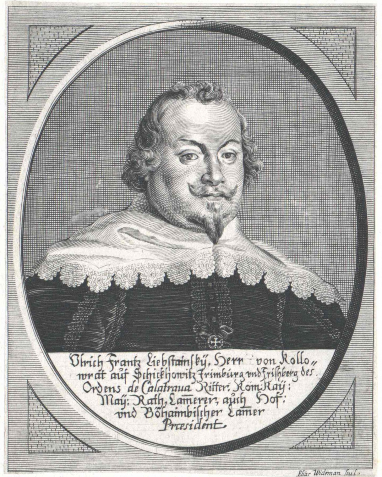 Oldřich František Libštejnský z Kolovrat (1607–1650)